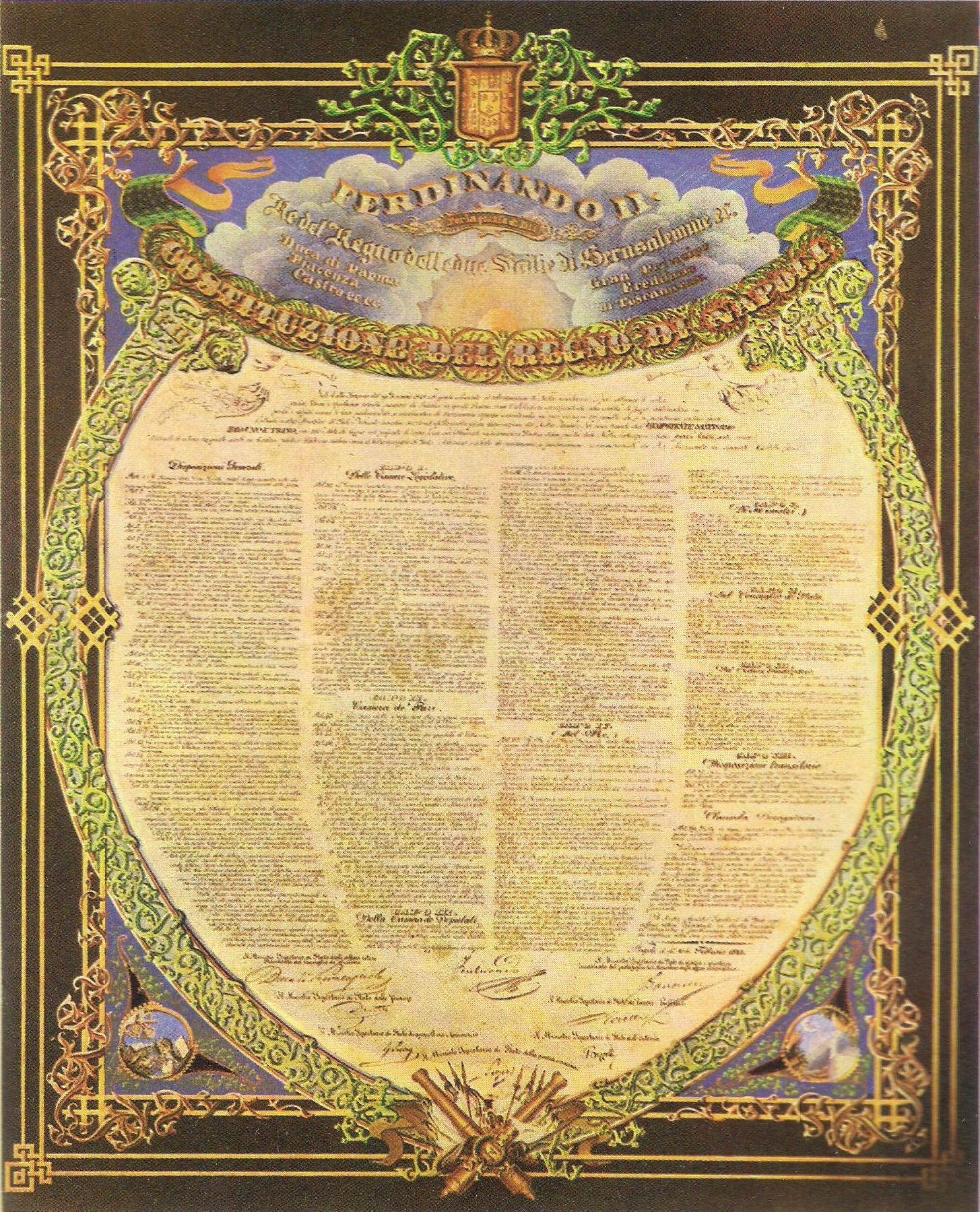 La costituzione concessa da Ferdinando II nel 1848 per il Regno delle Due Sicilie.